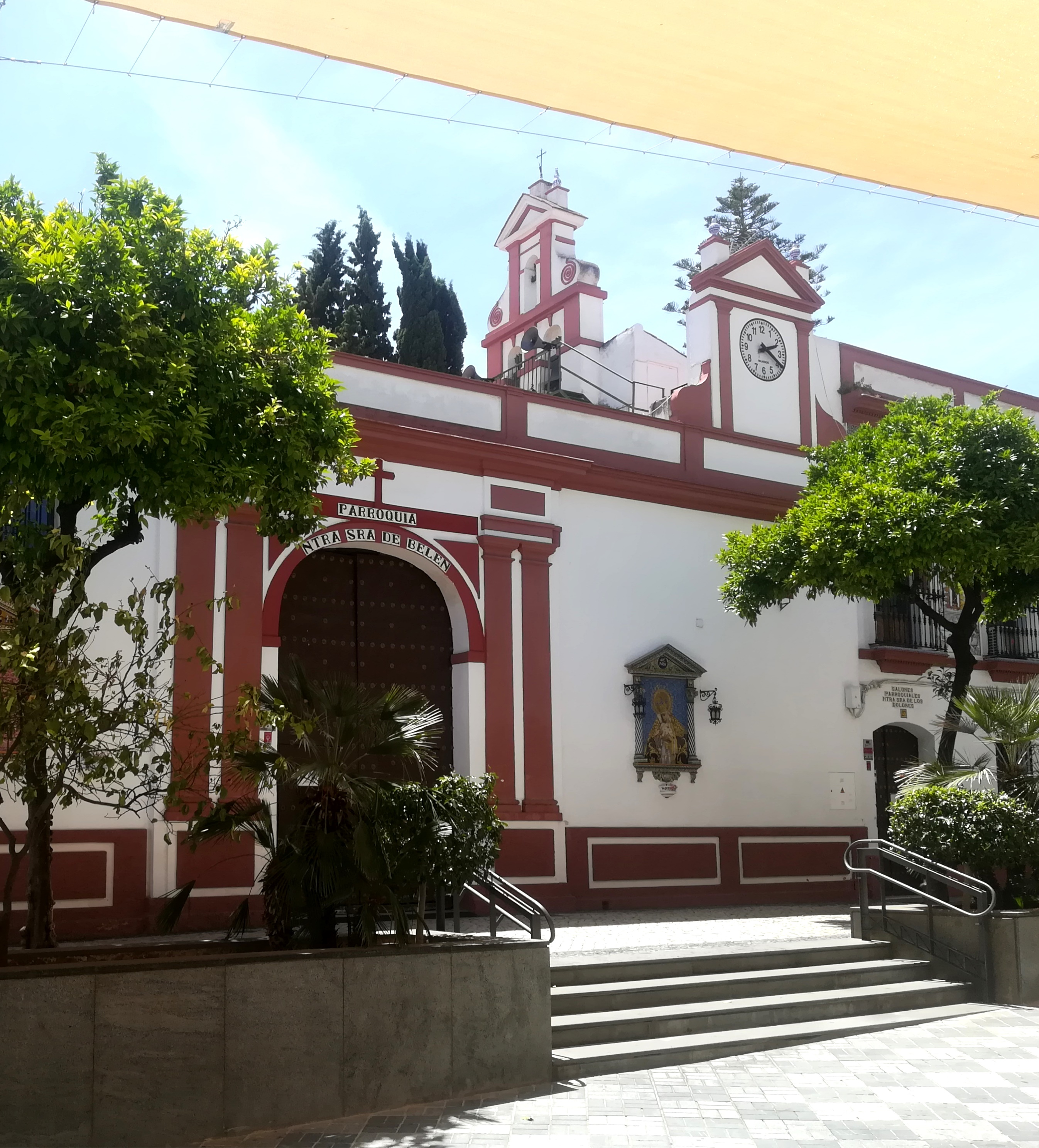 Iglesia de Nuestra Señora de Belén. Tomares, provincia de Sevilla, Andalucía, España.